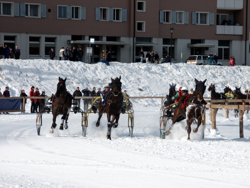 Horse (Equus ferus caballus)